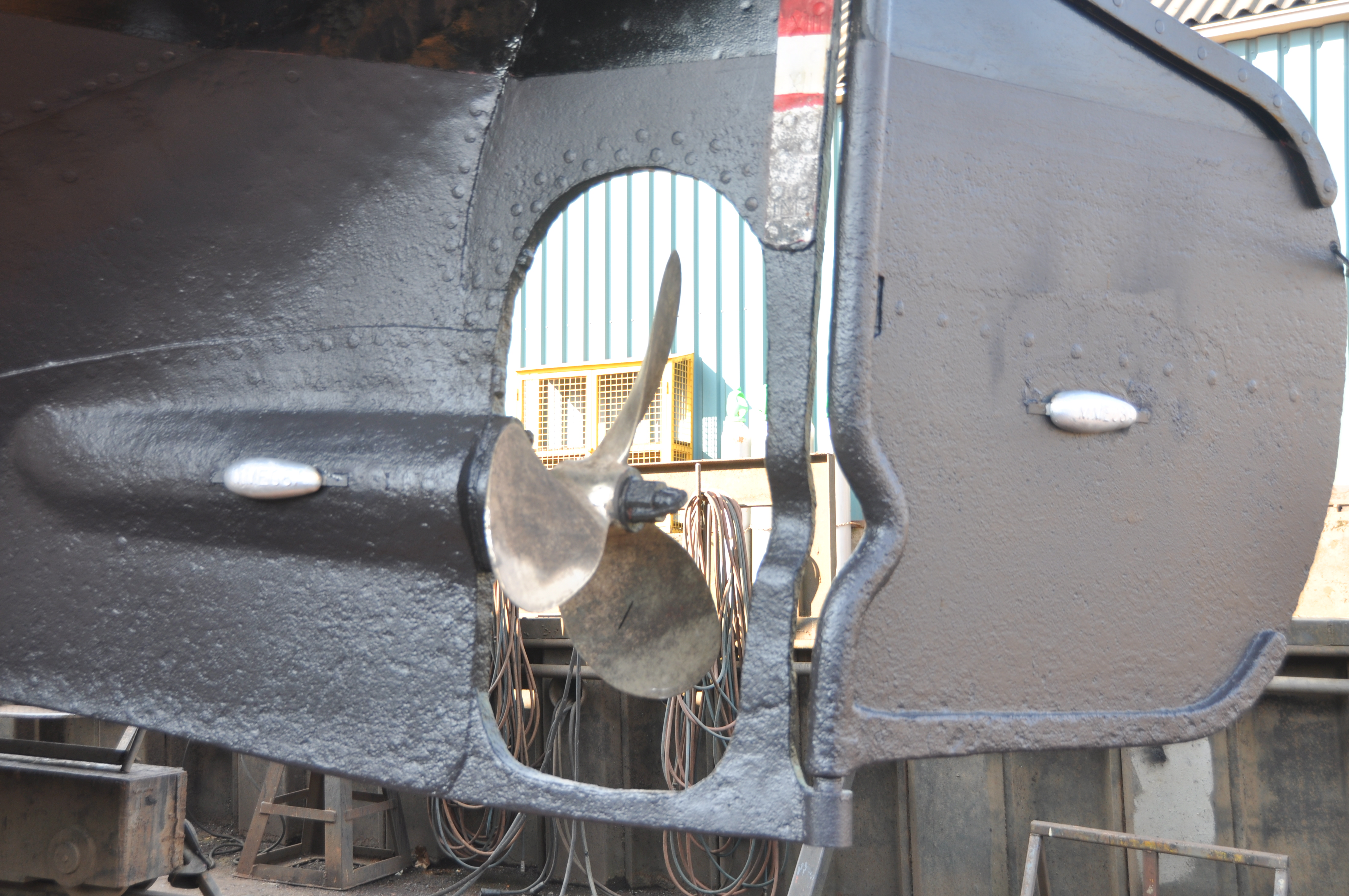 Hellingbeurt van de STELLA MARIS bij scheepswerf Het Anker in Hendrik Ido Ambacht.